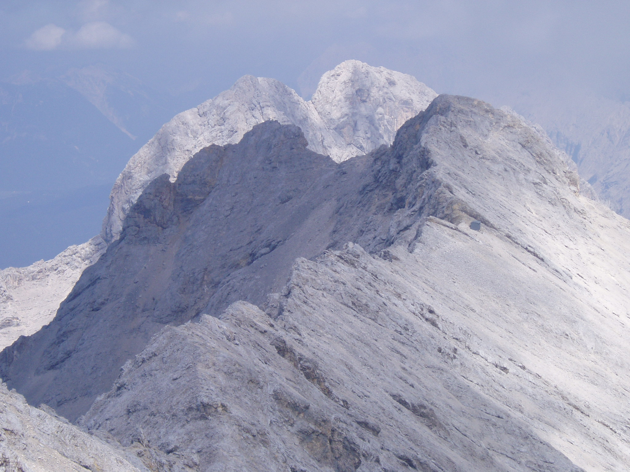 Jubiläumsgrat mit Biwakschachtel von W, Wetterstein